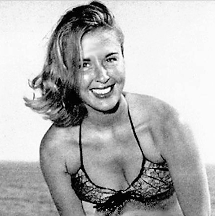 Barbara Freking